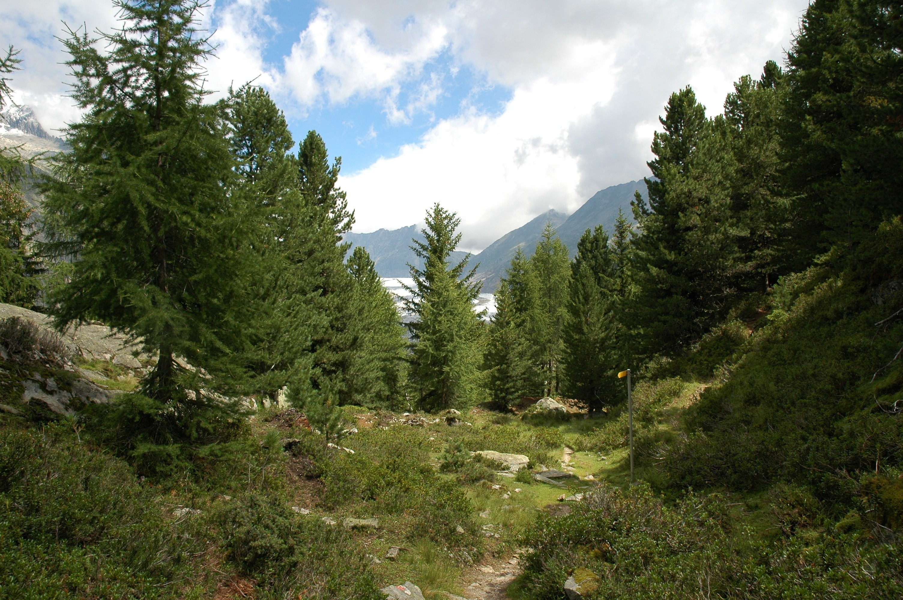 Aletschwald unterhalb der "Villa Cassel"